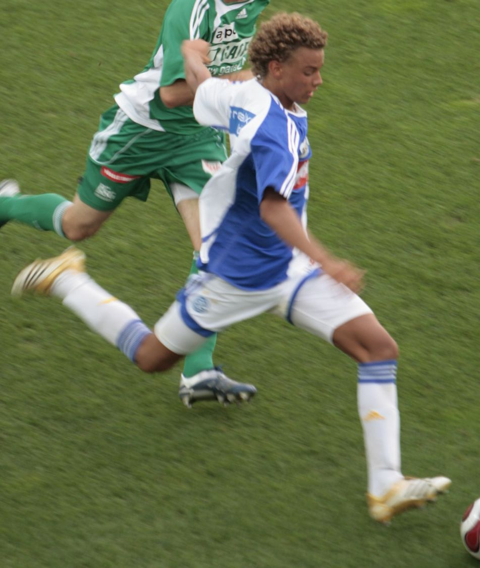 Rolf Feltscher, soccerplayer GC Zurich